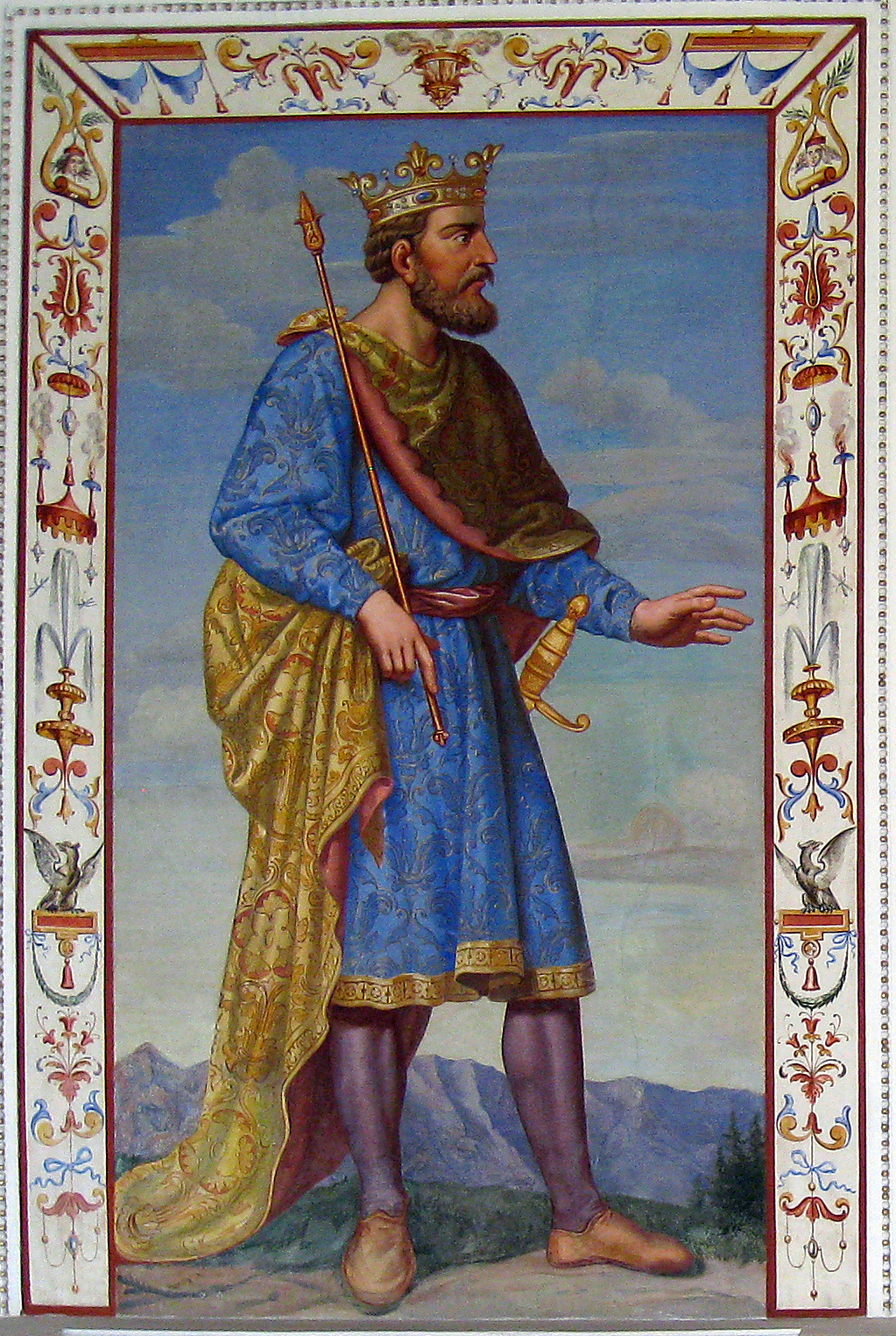 Henry VI, Duke of Carinthia